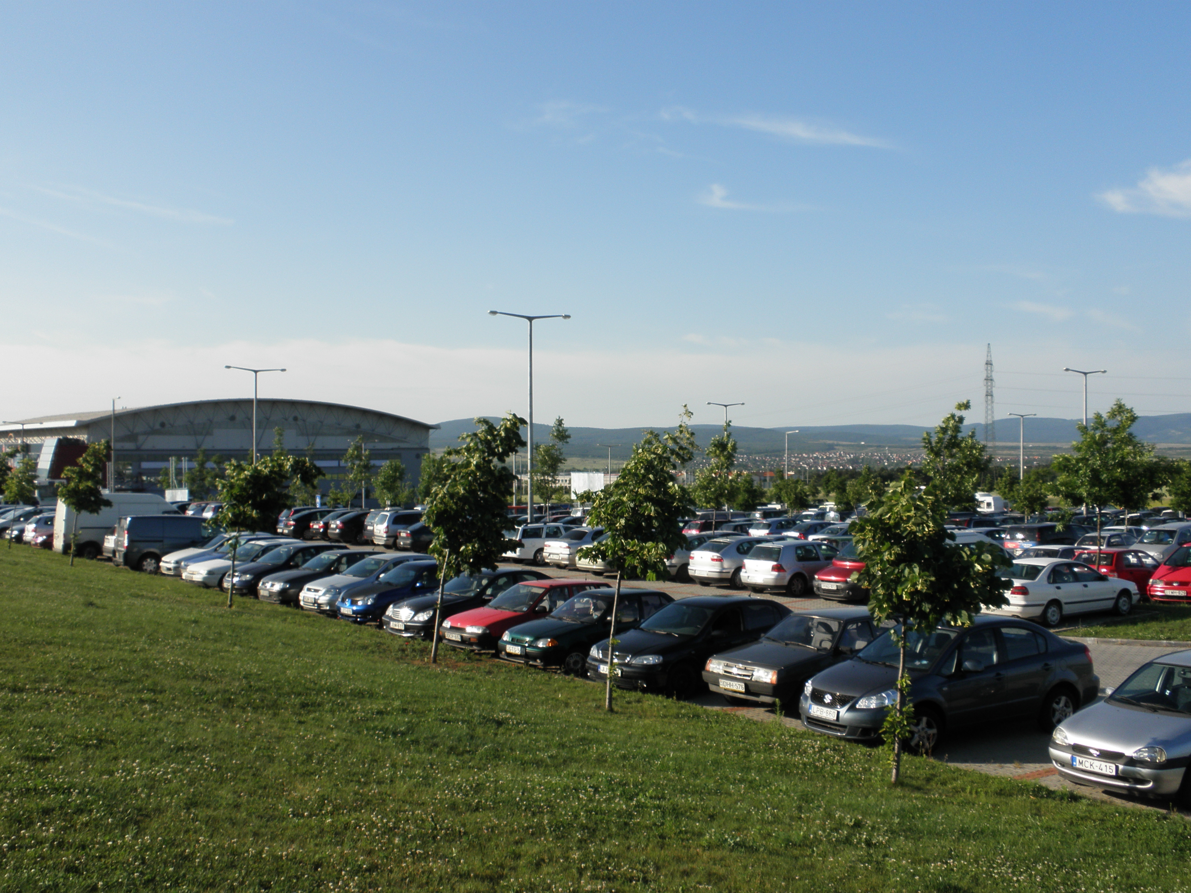 parkoló aréna mellett